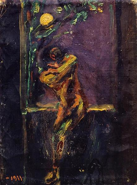 Oleo sobre tela